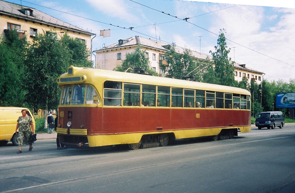 Трамвай на пр. Ломоносова, Архангельск